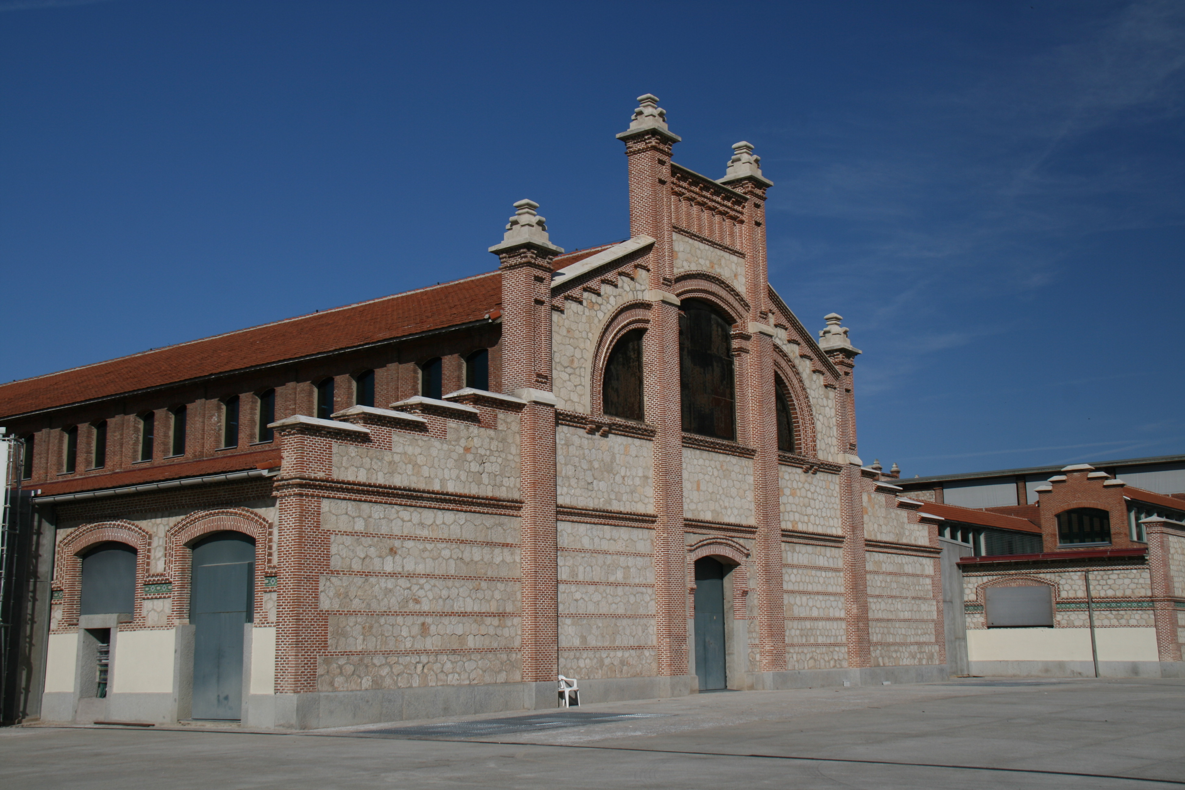 Parte trasera de la nave de degüello de ganado lanar - Matadero de Arganzuela